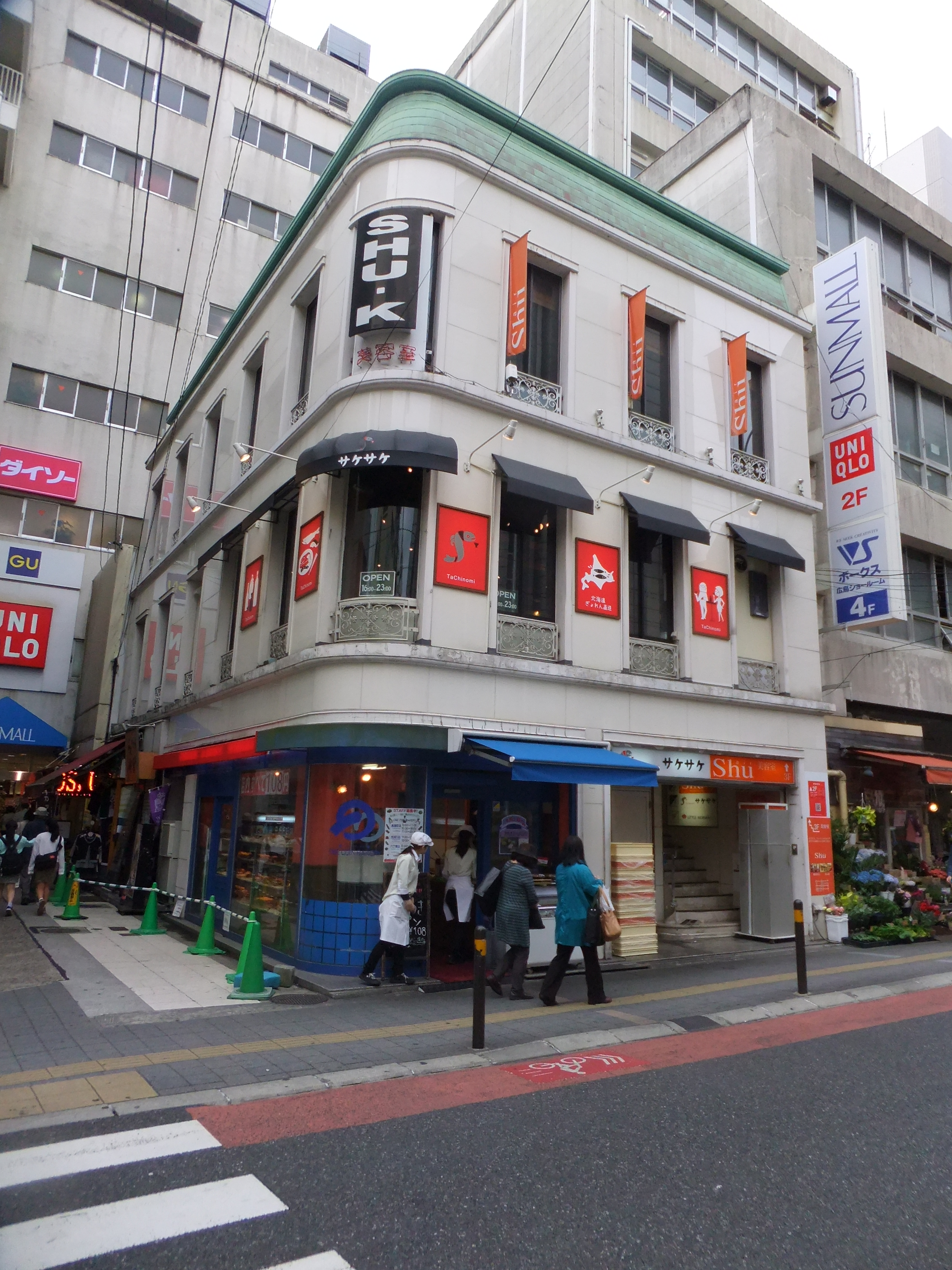 サンモールキャラクト館